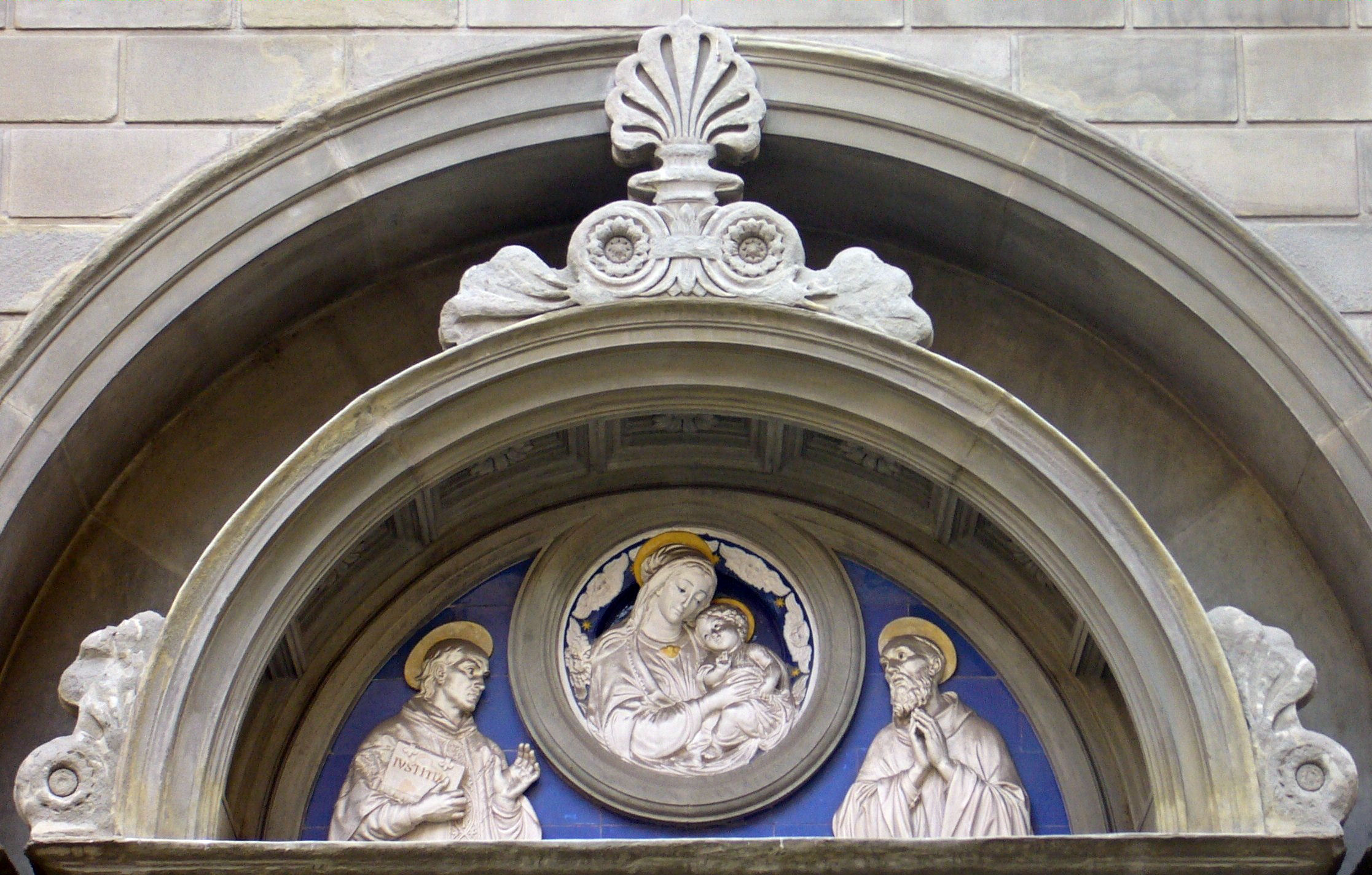 Tympan de l'église Saint Yves des Bretons réutilisant une céramique plus ancienne des ateliers Della Robia (le médaillon de la Vierge) à laquelle Adriano Ferraresi ajoute deux personnages en 1878 : celui de Saint Yves à droite, celui de Saint Bernard à gauche.